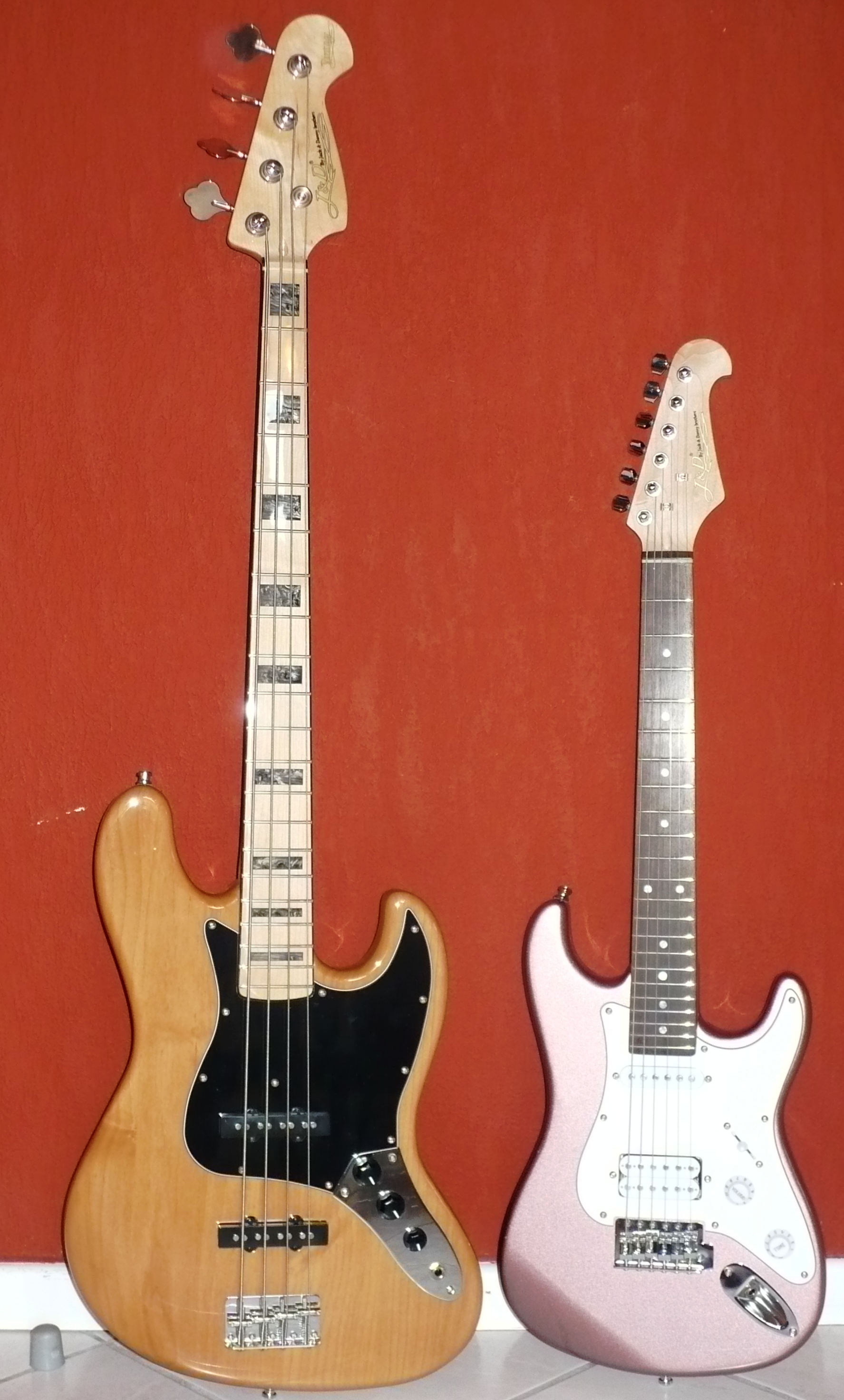 Jack&Danny JB Vintage 1975 Bass und ST Mini in Sonderlackierung anlässlich der Frankfurter Musikmesse 2011 J&D By Jack & Danny brothers Guitars J&D JB Vintage 1975 bass J&D ST Mini